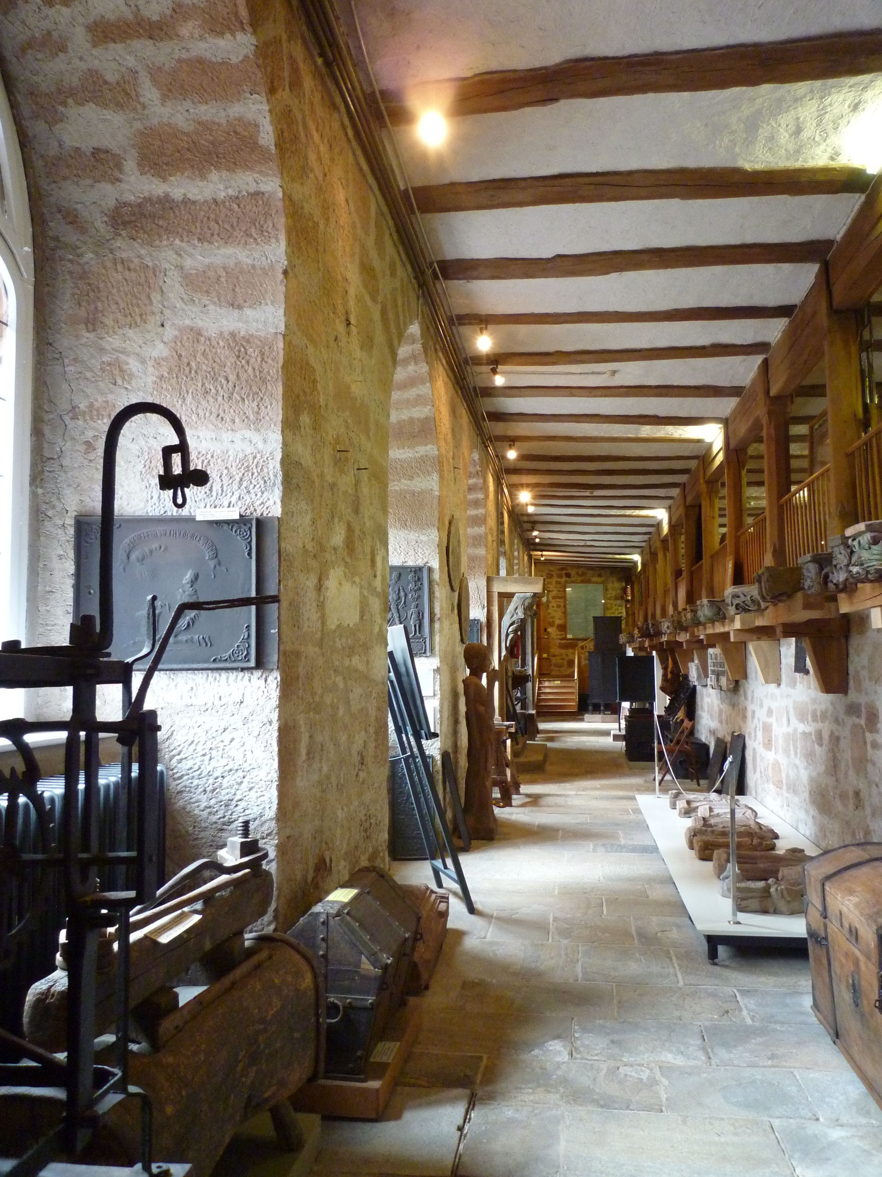 Frankenberg - Kloster St.Georgenberg ab 1242, Museum